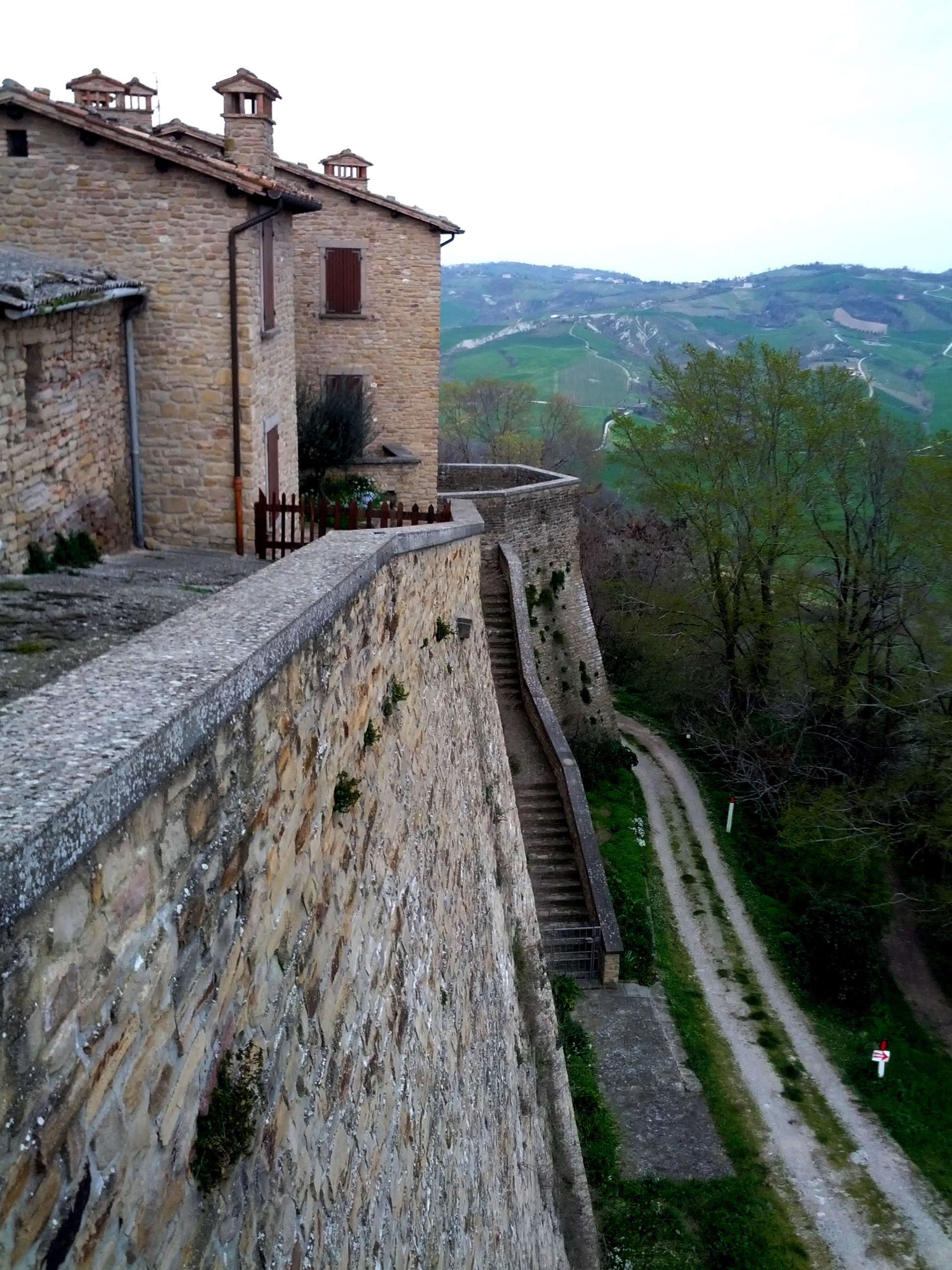 Borgo di Teodorano. Meldola, Forlì-Cesena, Italia.